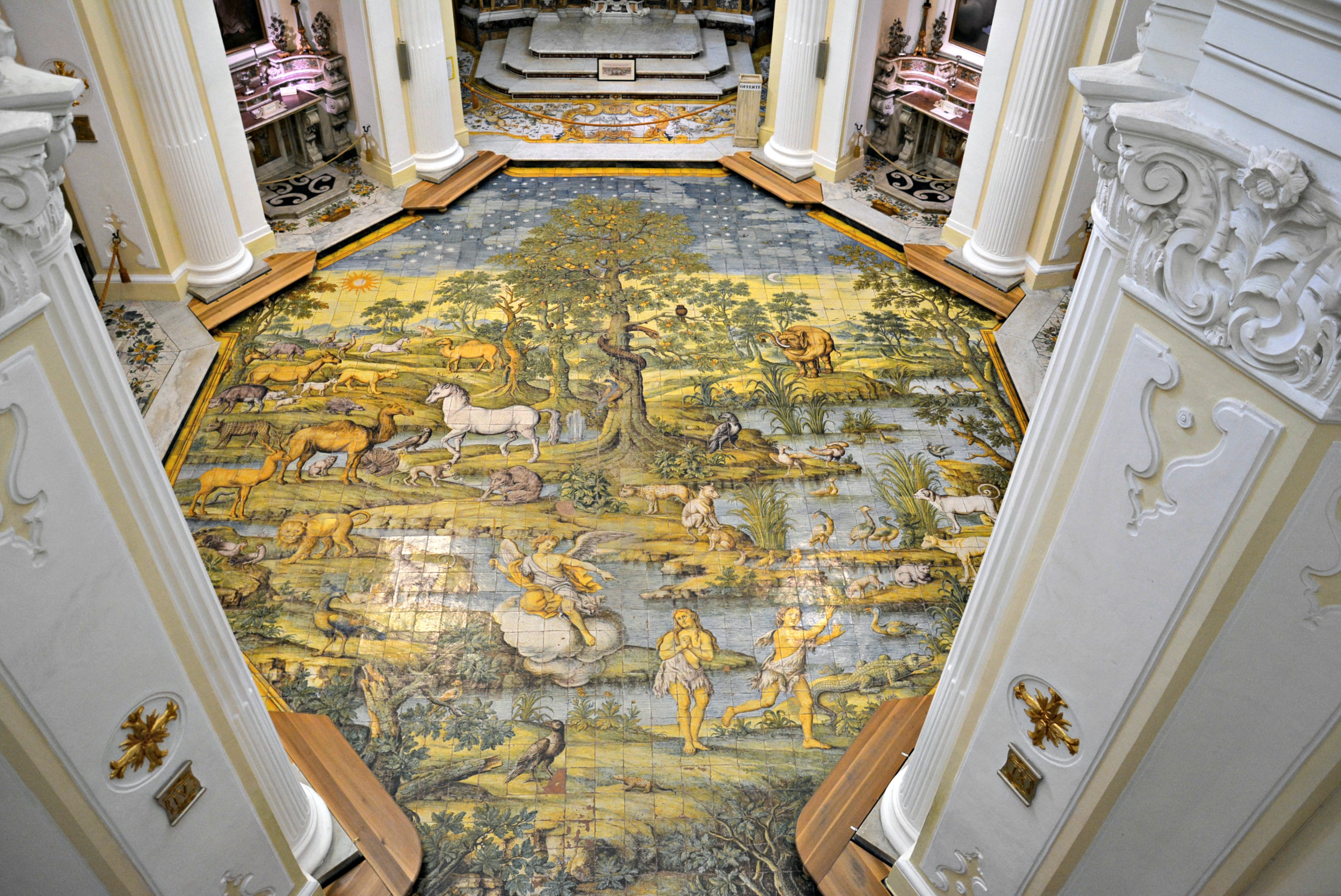 Vedi titolo